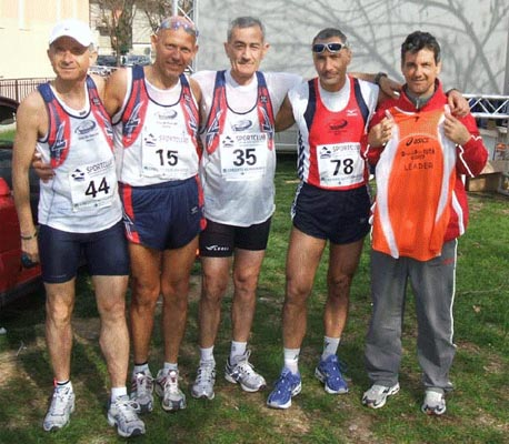 24 ore del Delfino 2007 - Atleti ASD Villa de Santis (Roma) prima della gara